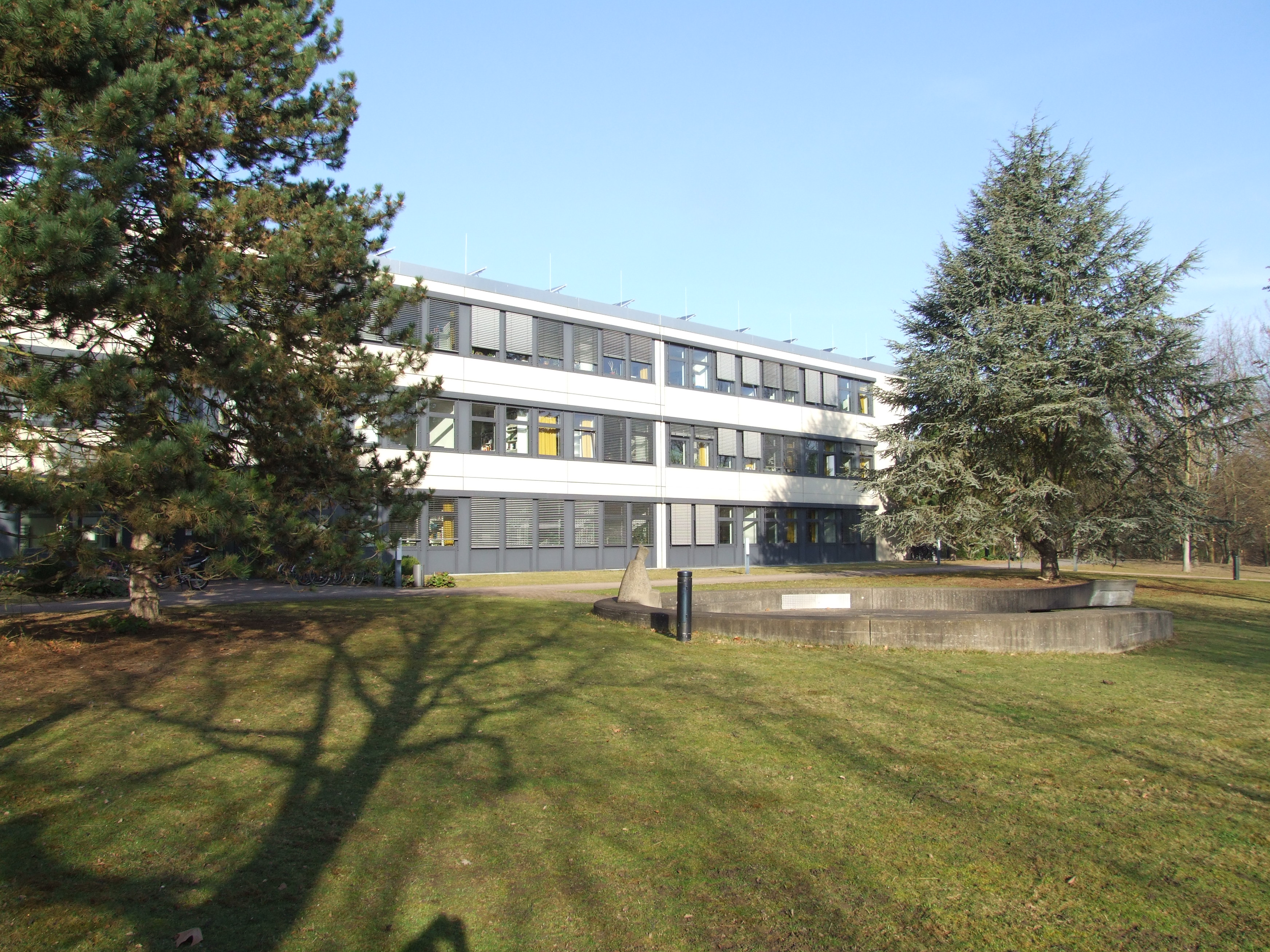 Universität Speyer, Freiherr-vom-Stein-Str. 2